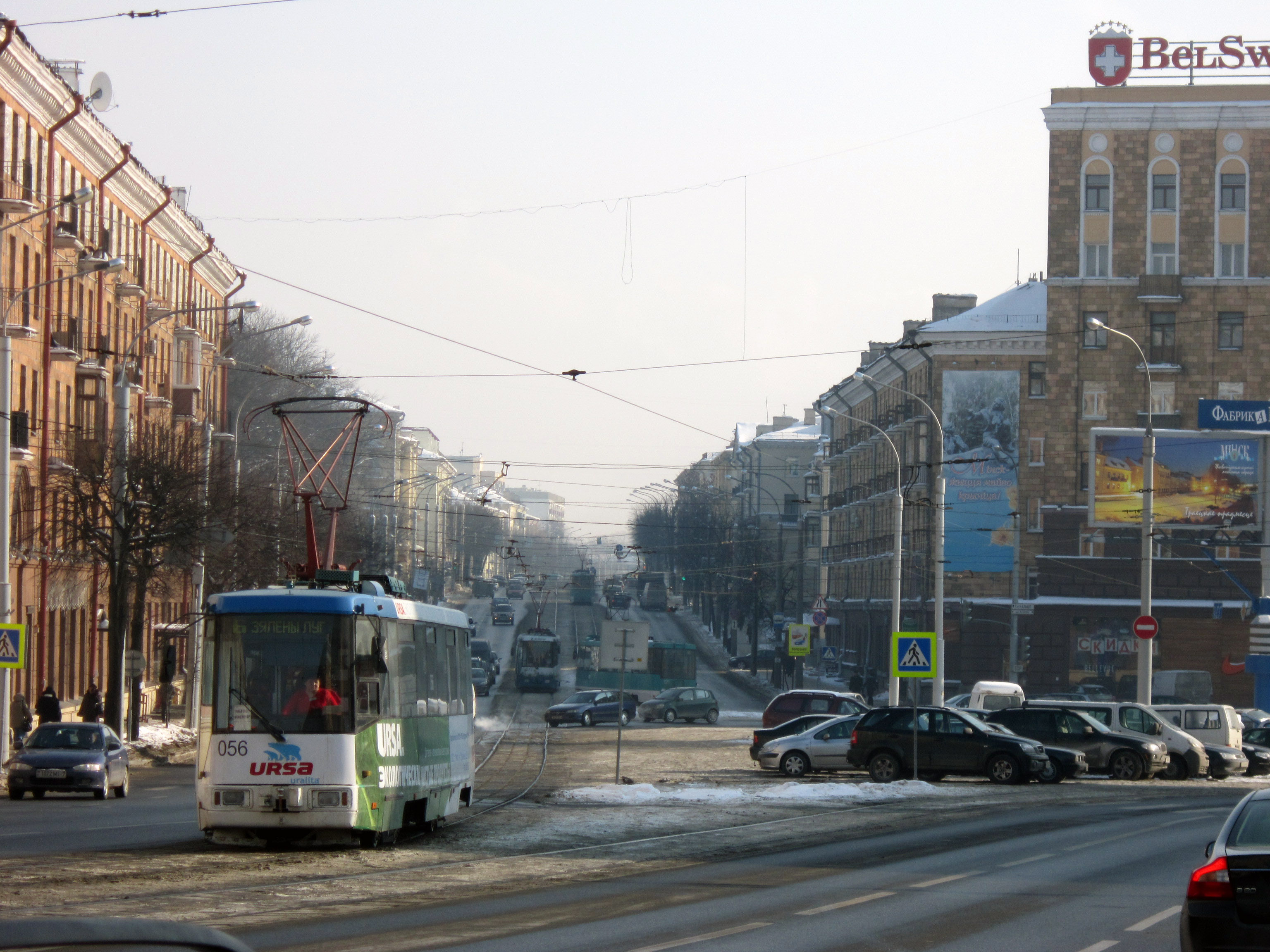 Минск. Улица Козлова